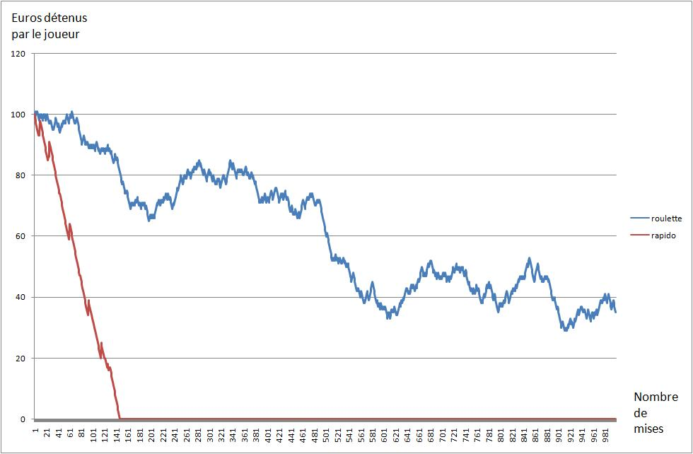 Simulation entre un joueur de rapido et un joueur de roulette, pour l'article "Rapido" sur le wikipédia en langue française